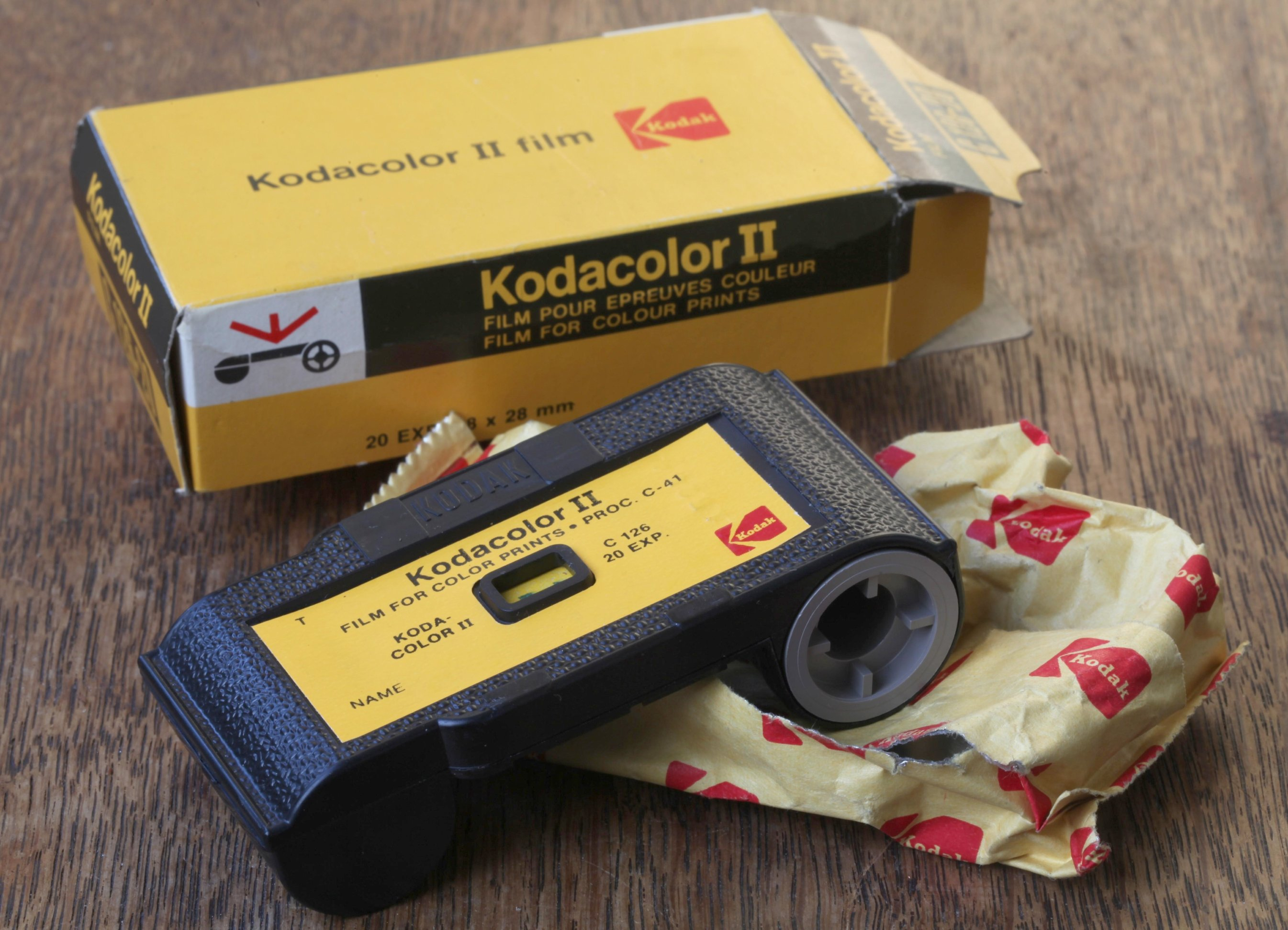 Kodacolor II film C 126-20 100 ASA /21 DIN 126 film 126 film cartridge expiring date 1980